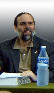 Vermondo Brugnatelli